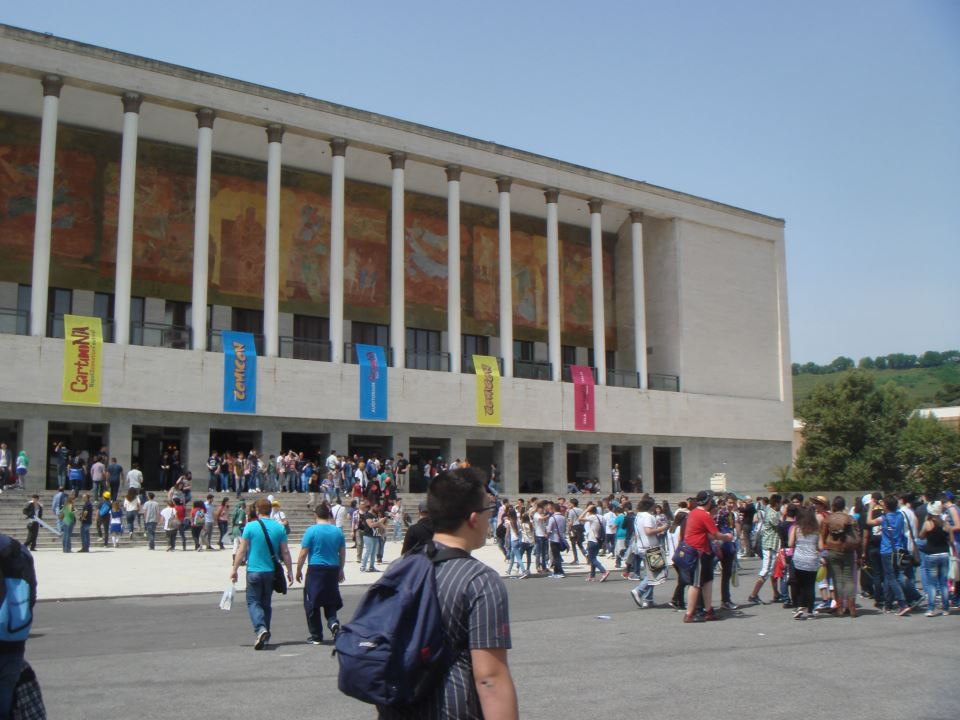 autore: Salvatore Architravo / ARCHIsavio.